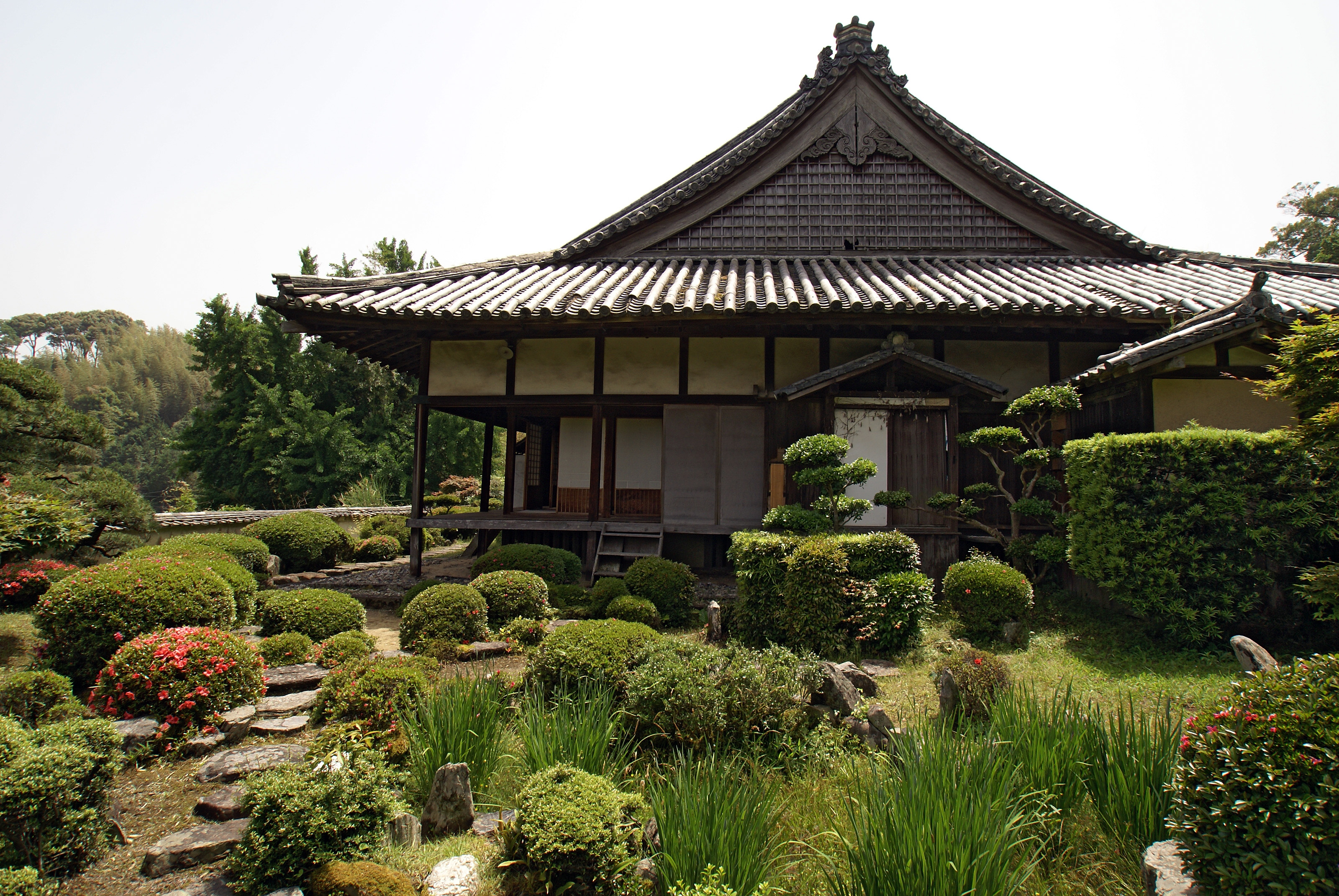 Juzenritsuin in Kinokawa, Wakayama prefecture, Japan